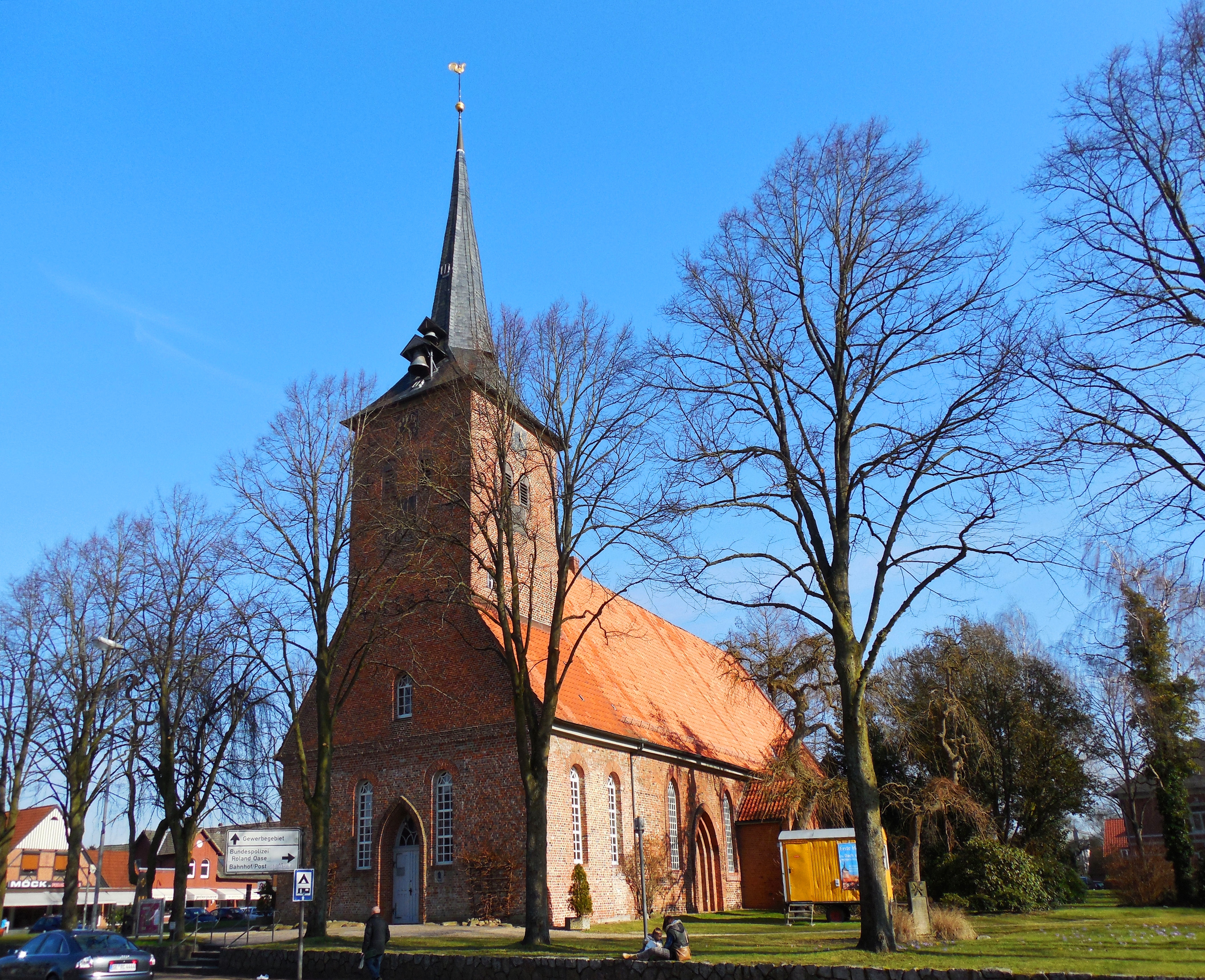 Maria-Magdalena Kirche